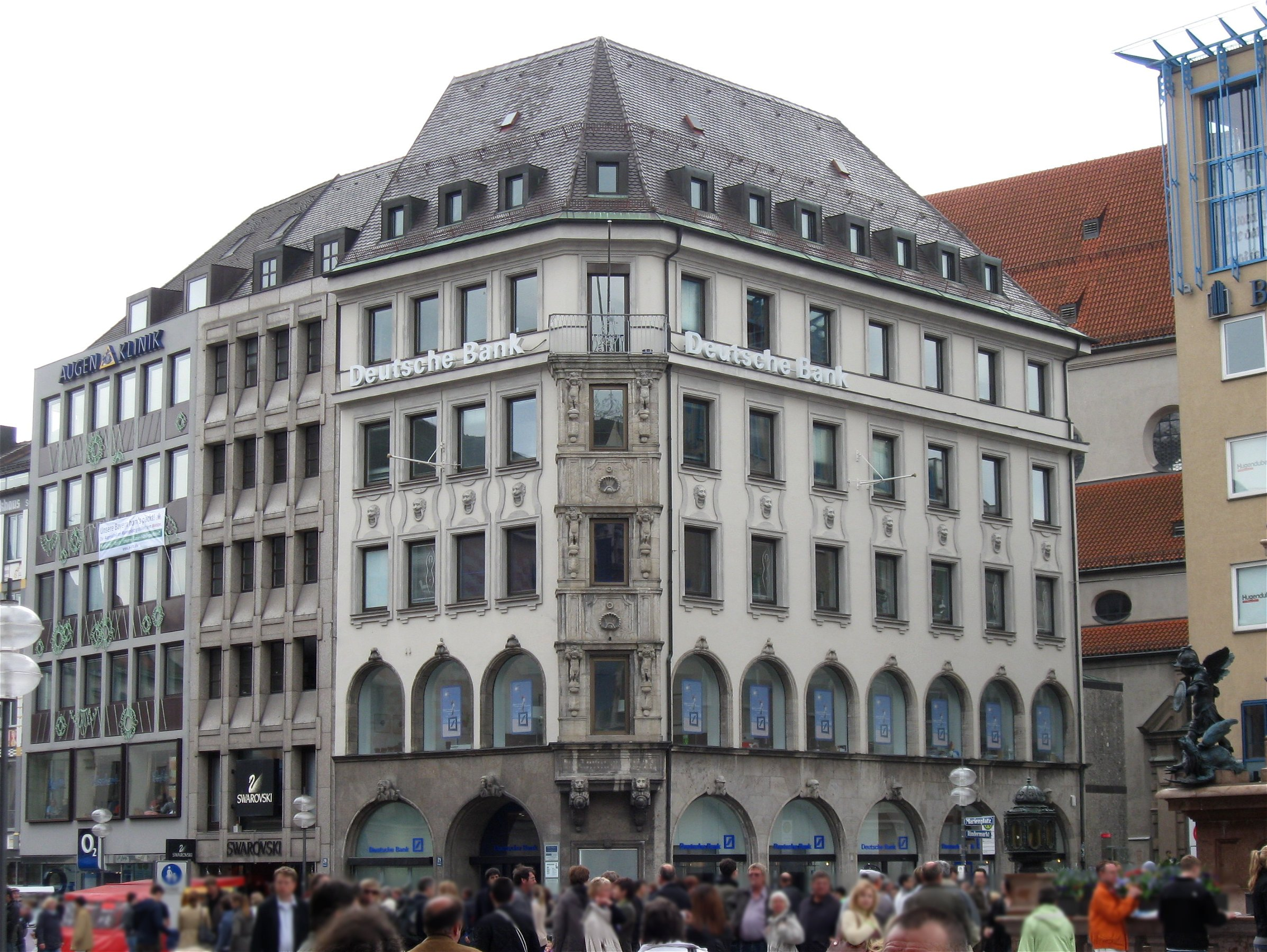 Marienplatz 21; Wohn- und Geschäftshaus, fünfgeschossiger Eckbau mit Arkaden im natursteinverkleideten Erdgeschoss und Naturstein-Eckerker, in historisierenden Formen, von Georg Meister und Oswald Eduard Bieber, 1911.